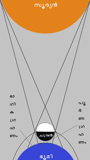 സൂര്യഗ്രഹണം ഈ ചിത്രം അളവുകൾ കൃത്യമായി പാലിക്കുന്നില്ല